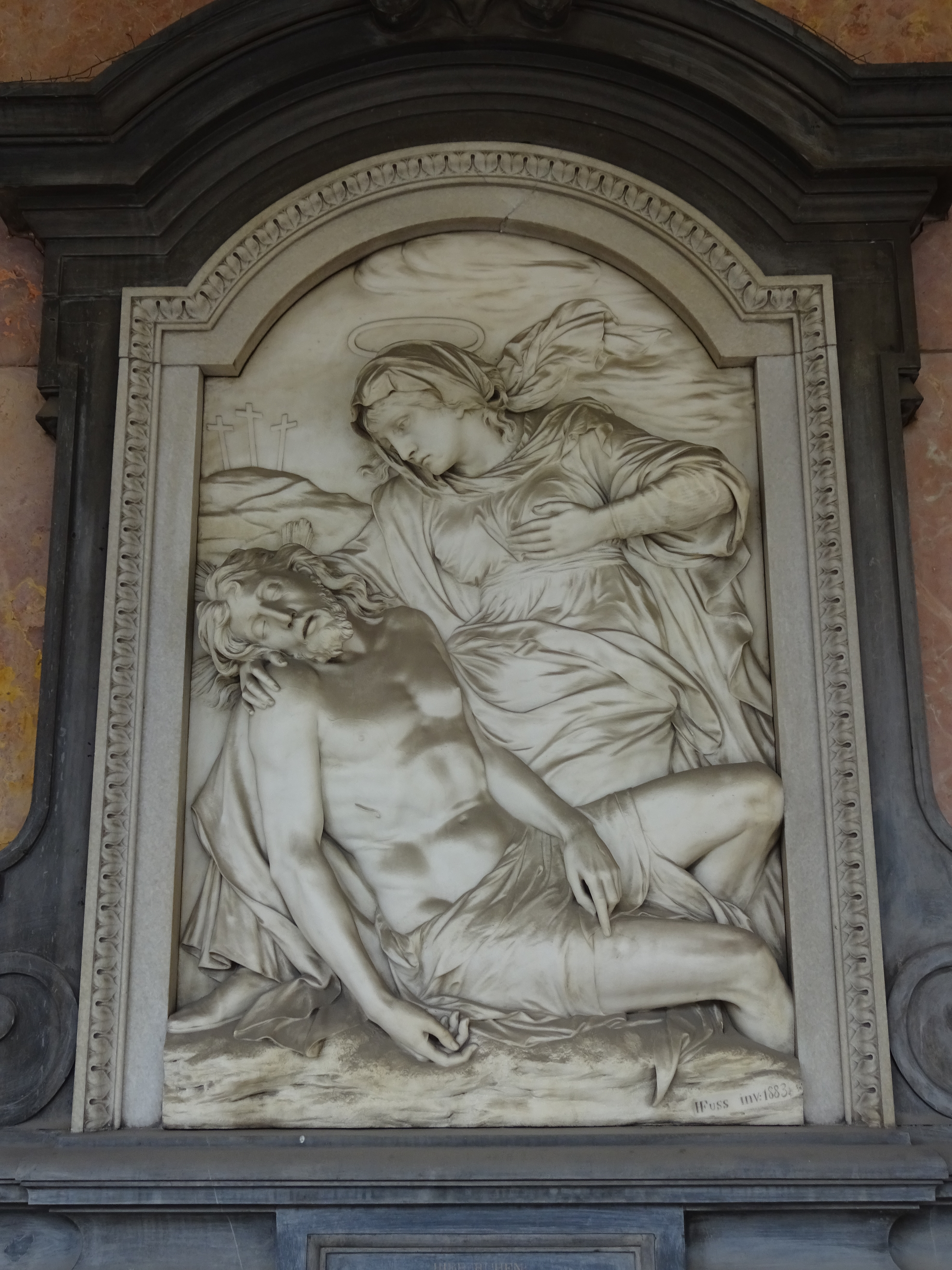 Friedhof Wilten, Grabstätte Gassner, Relief Pietà von Heinrich Fuss, 1883